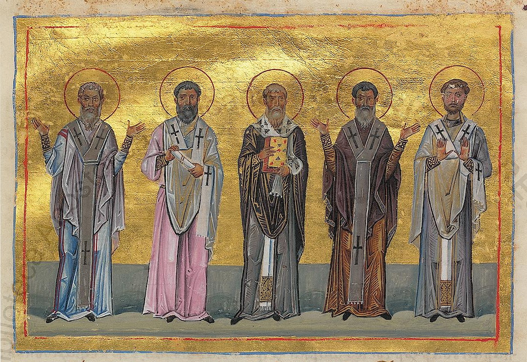 Миниатюра из Минология Василия II.